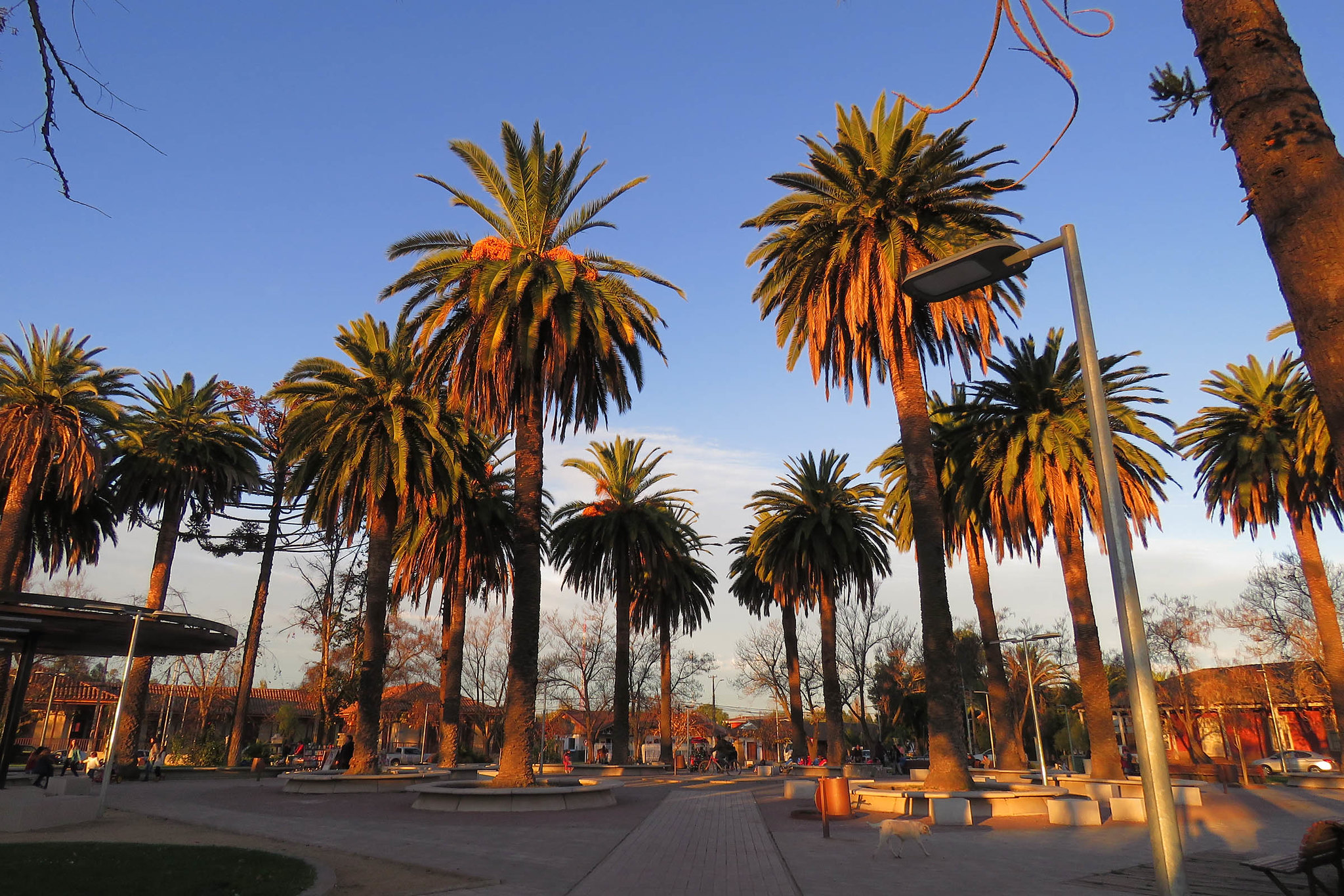 Chepica, palmeras en plaza. Palmeras.